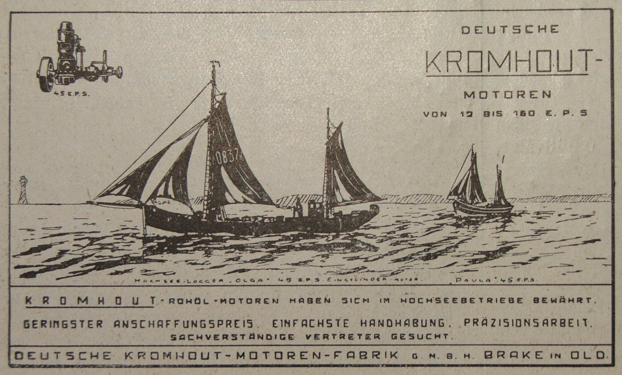 Annonce der Motorenfirma "Deutsche Kromhout" 1913